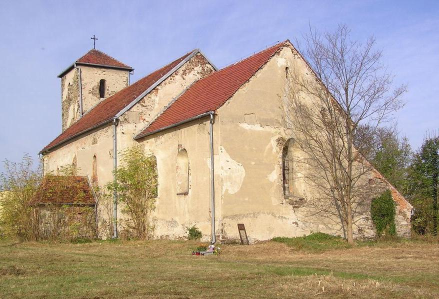 Udanin - kościół p.w. św. Urszuli (zabytek nr rejestr. A/1122/1667)